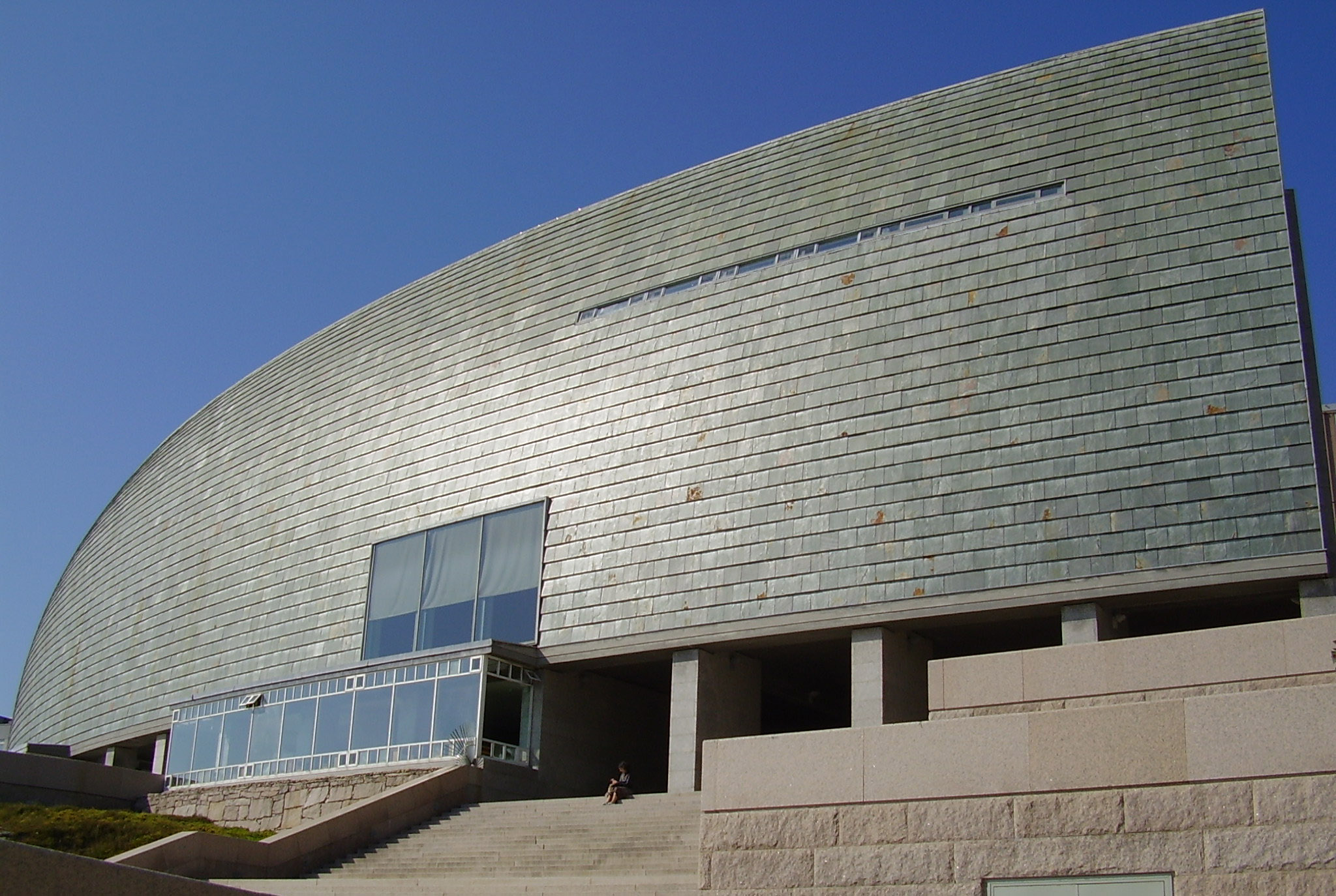 Domus, la Casa del Hombre, museo científico de La Coruña